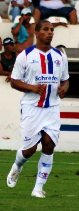 Rafael Costa jogando pelo Itumbiara contra o Mineiros no Campeonato Goiano de 2009.